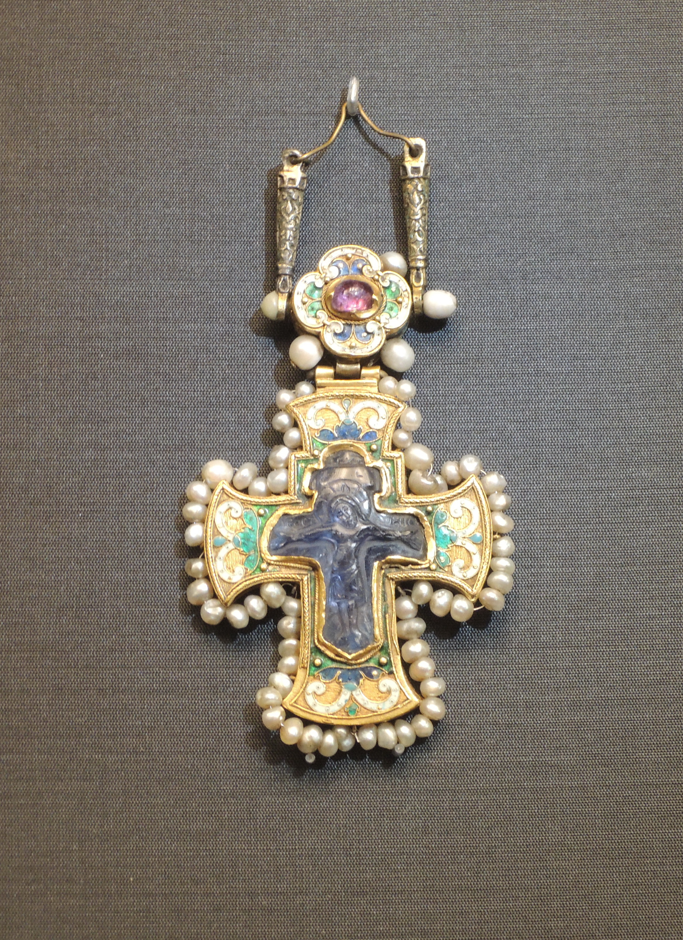 Крест наперсный. Мастерские Московского Кремля,ок. 1554 камея - Византия, конец XII - начало XIII вв. Золото, камея на сапфире, рубин, жемчуг Скань, эмаль, резьба, зернь Высота 8.3 см. Ширина 5.5 см. Подарен Евдокией Лукъяновной царевне Ирине Михайловне в 1627 г. Золотой четырехконечный наперсный крест с крестообразным оглавием и резным высокорельефным изображением Распятия на сапфире украшен эмалью по скани, драгоценными камнями и жемчугом. На закругленных слегка расширенных концах креста с обеих сторон – сканый растительный орнамент из стилизованных листьев и завитков, заполненных глухой белой, глубой, прозрачной зеленой и синей малью. На лицевой стороне креста в эмаль вплавлена мельчайшая зернь. Оглавие с лицевой, оборотной и боковой сторон украшено аналогичным эмалевым орнаментом. По краю его – белая эмалевая полоса в сканом обрамлении.